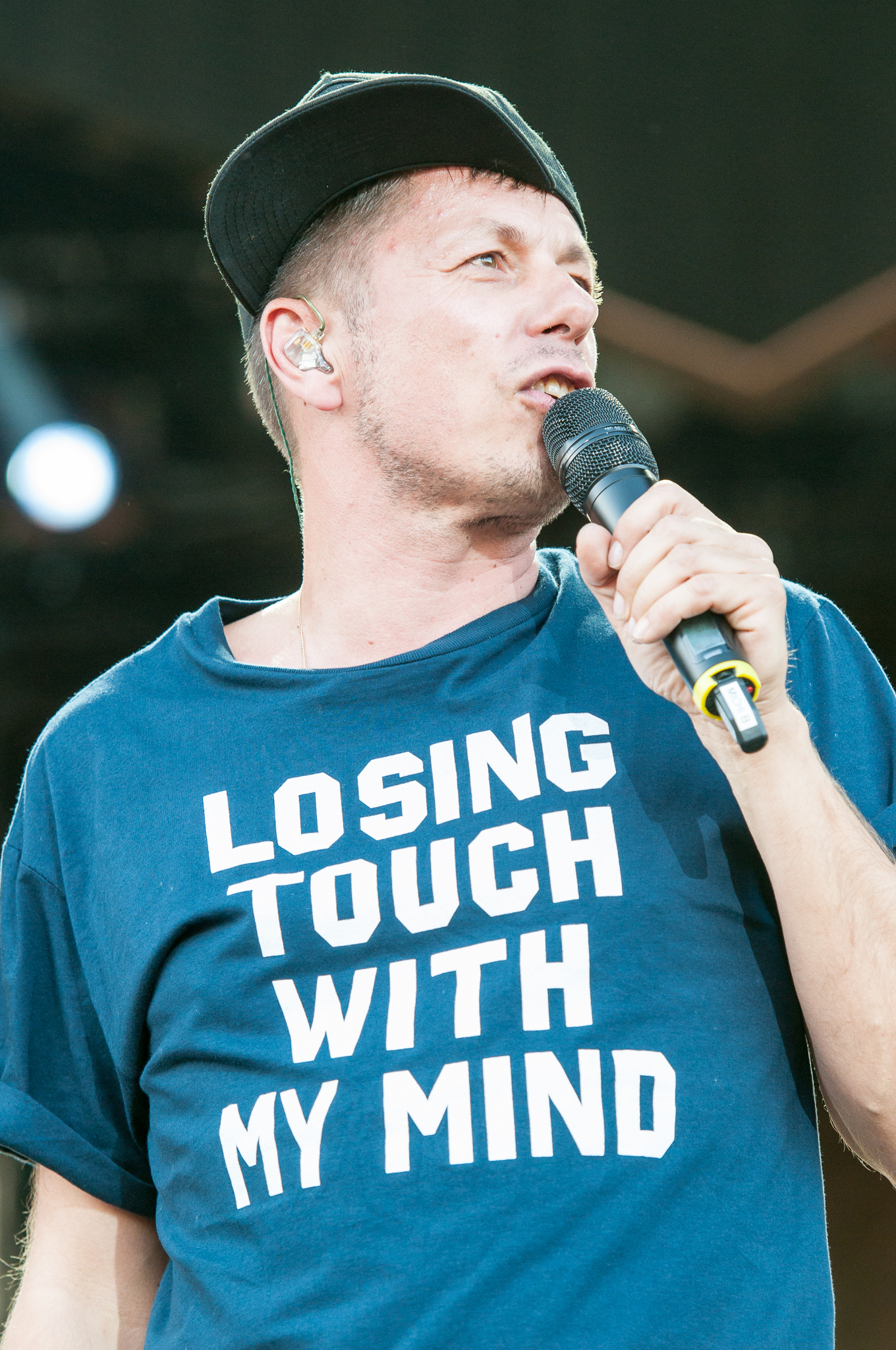 ARGO-Konzerte,Centerstage,Die fantastischen Vier,Fanta4,Konzert,Livekonzert,Livemusik,Michael Beck,Michi Beck,Musik,RiP,Rock im Park 2014